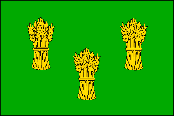 vlajka,Nová Ves u Nového Města na Moravě , okres Žďár nad Sázavou